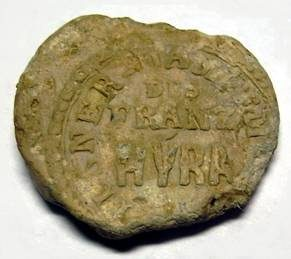 olověná mlynářská plomba